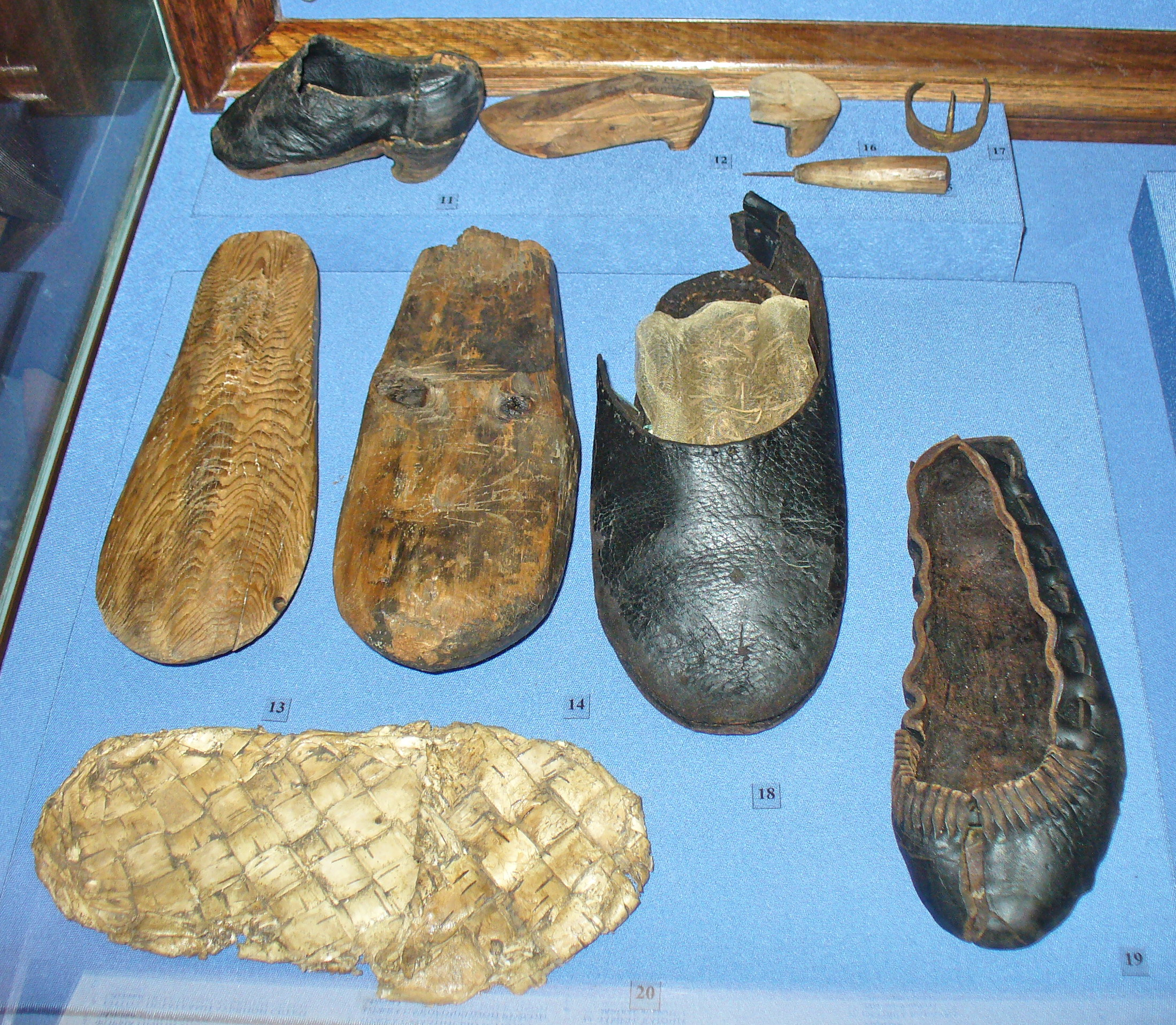 Обувь и инструменты сапожника из раскопок в Мангазее (1601-1672). Дальний ряд: детский башмак с наборным каблуком, колодка для детского башмака, шило, каблук, оковка каблука. Средний ряд: колодки для сапога, валенка, фрагмент сапога с соломенной стелькой, поршень. Вблизи - лапоть из бересты.